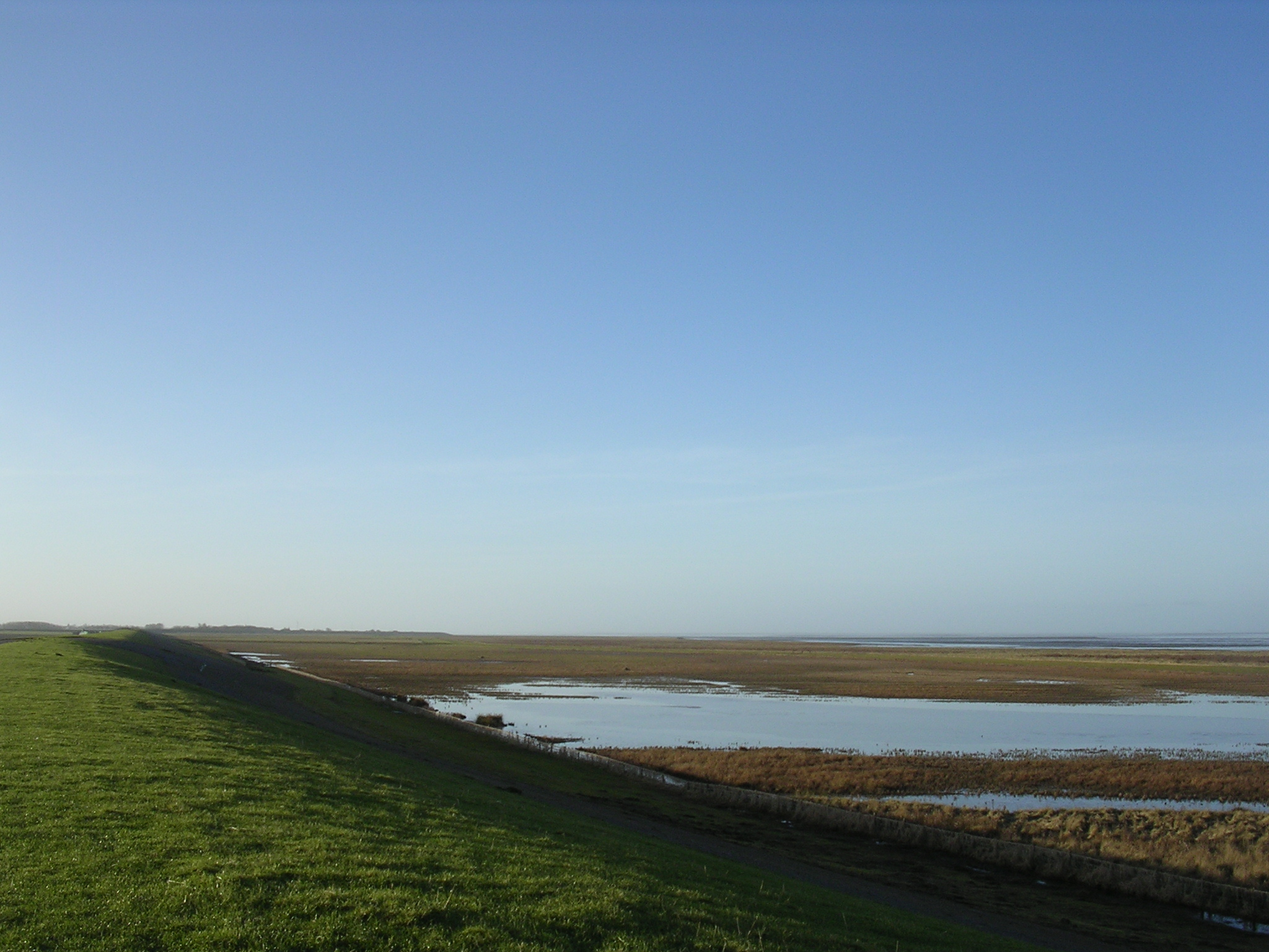 De Paezumerlannen (The nature reserve Paezumerlannen, north of Paesens)